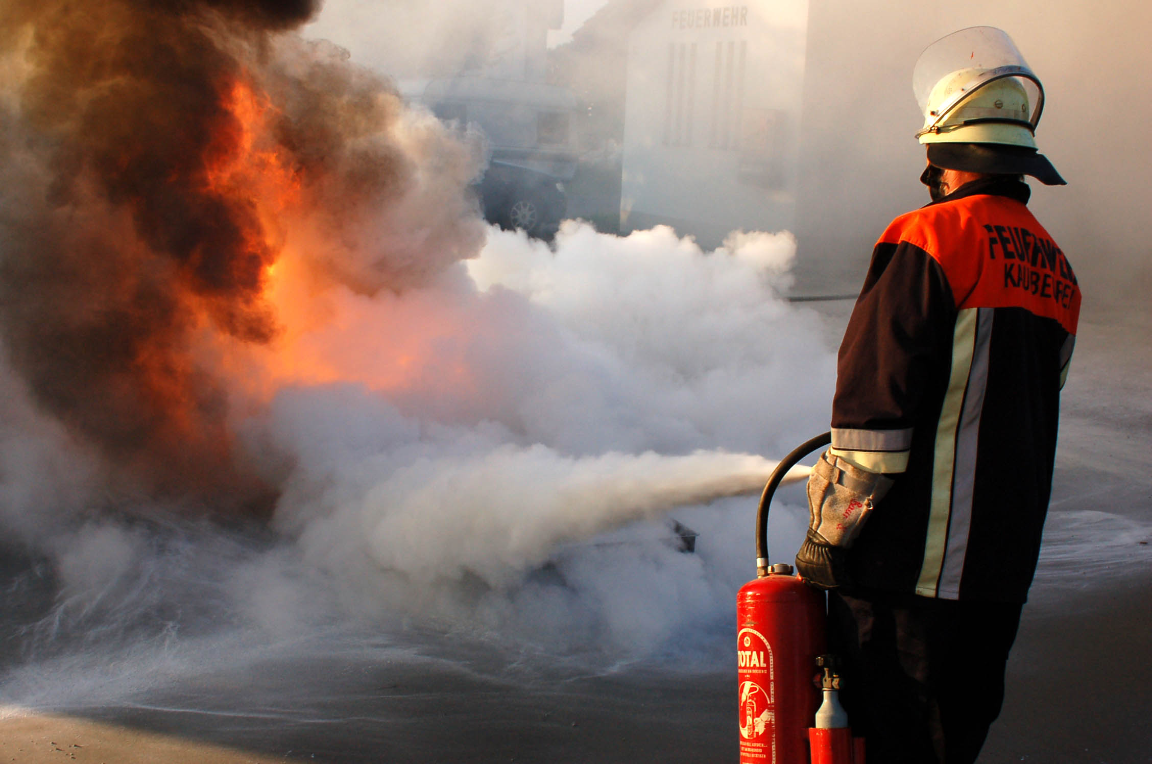 Feuerwehrmann mit aufgeladenem Pulverlöscher